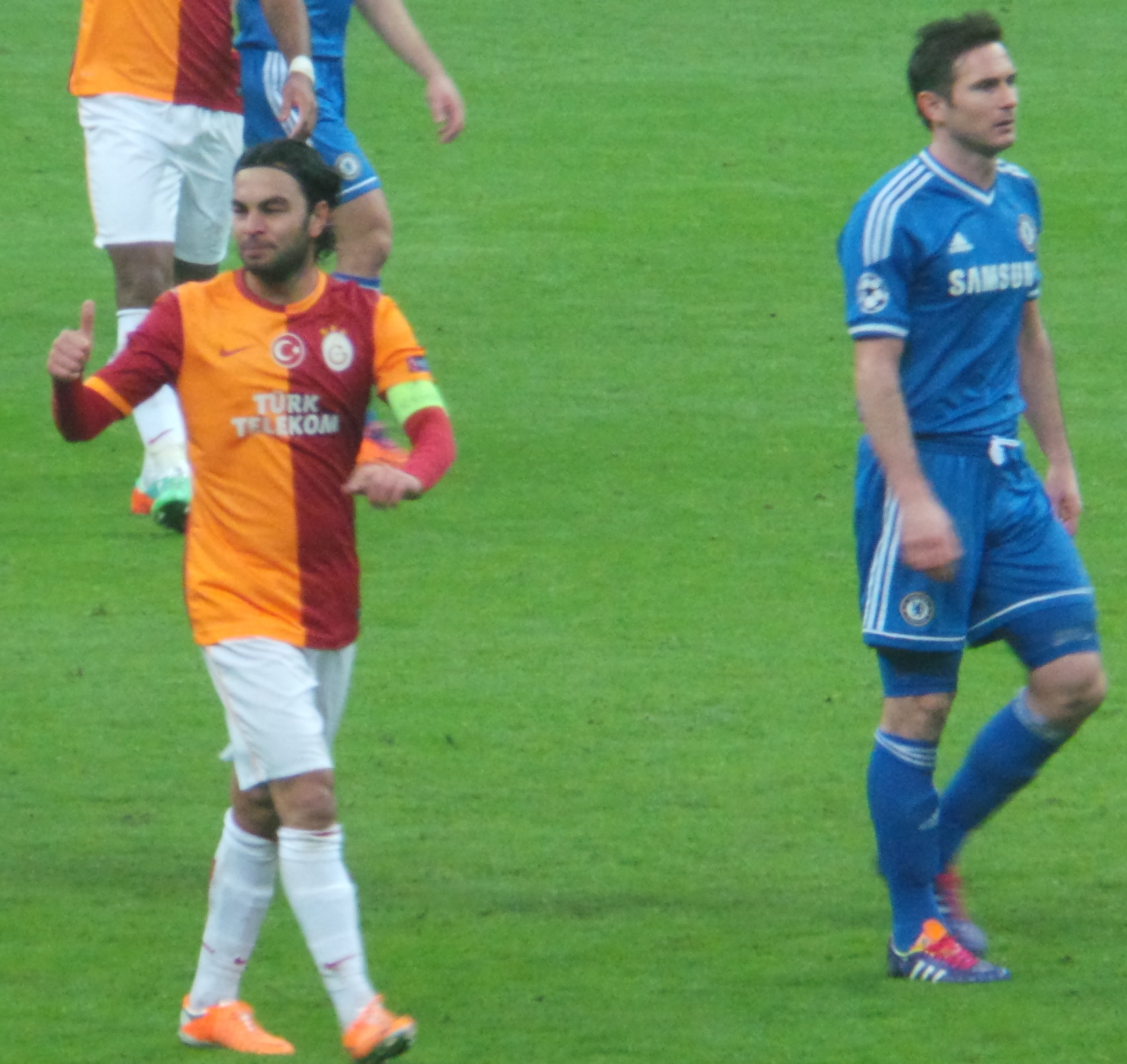 Selçuk İnan ve Frank Lampard